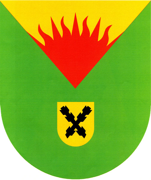 Znak obce Oudoleň